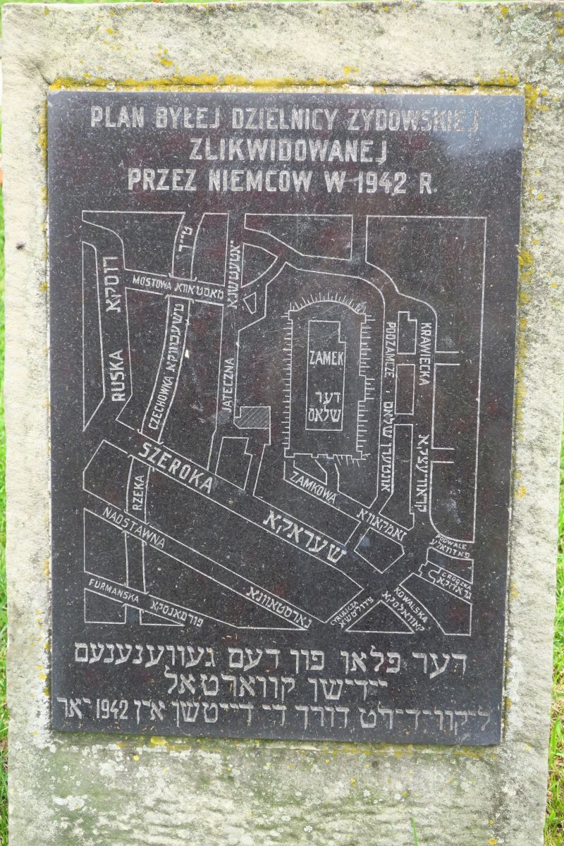 Obelisk przy placu Zamkowym w Lublinie z tablicą upamiętniającą nieistniejącą dzielnicę żydowską